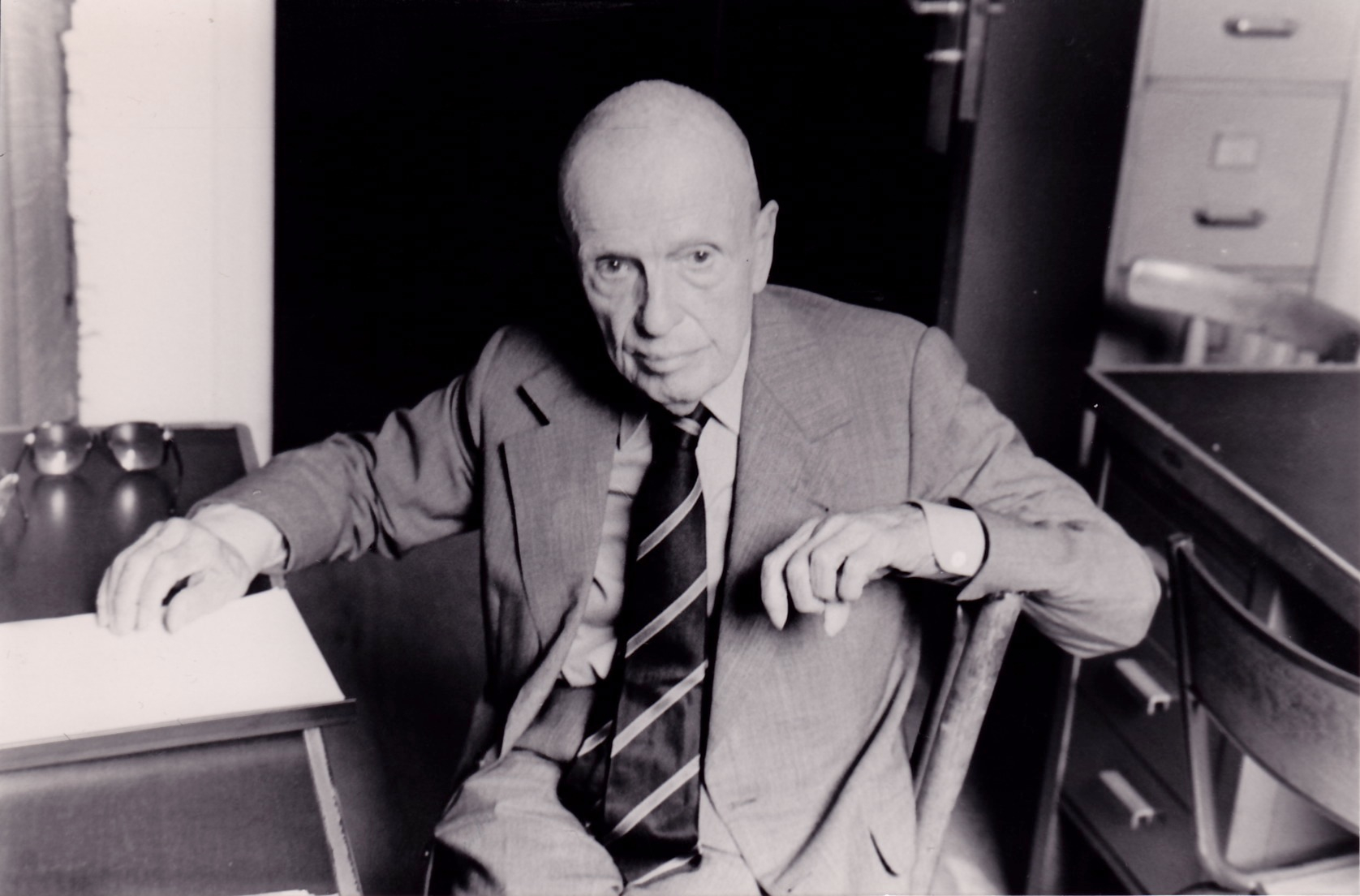 Michel Leiris dans son bureau du Musée de l'Homme en 1984.